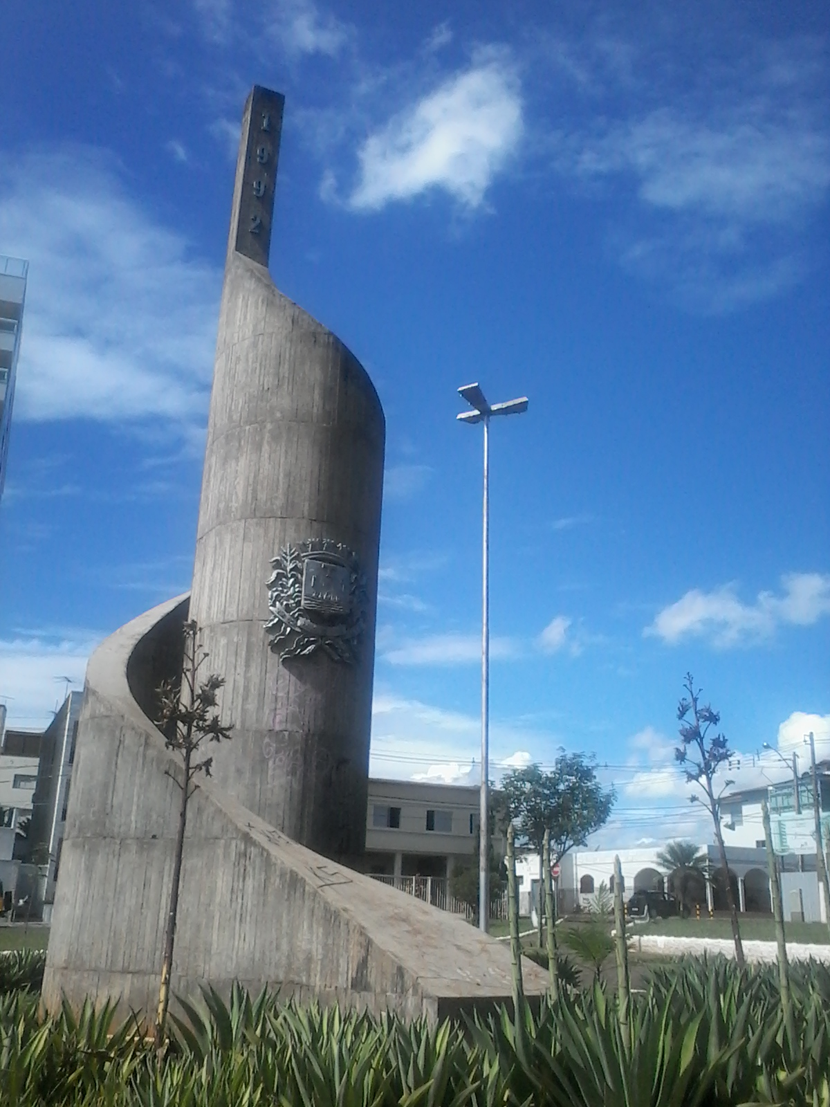 Monumento erguido em 1992 para a comemoração do 1º Centenário de Patos de Minas, no local onde a primeira igreja do município se localizava.